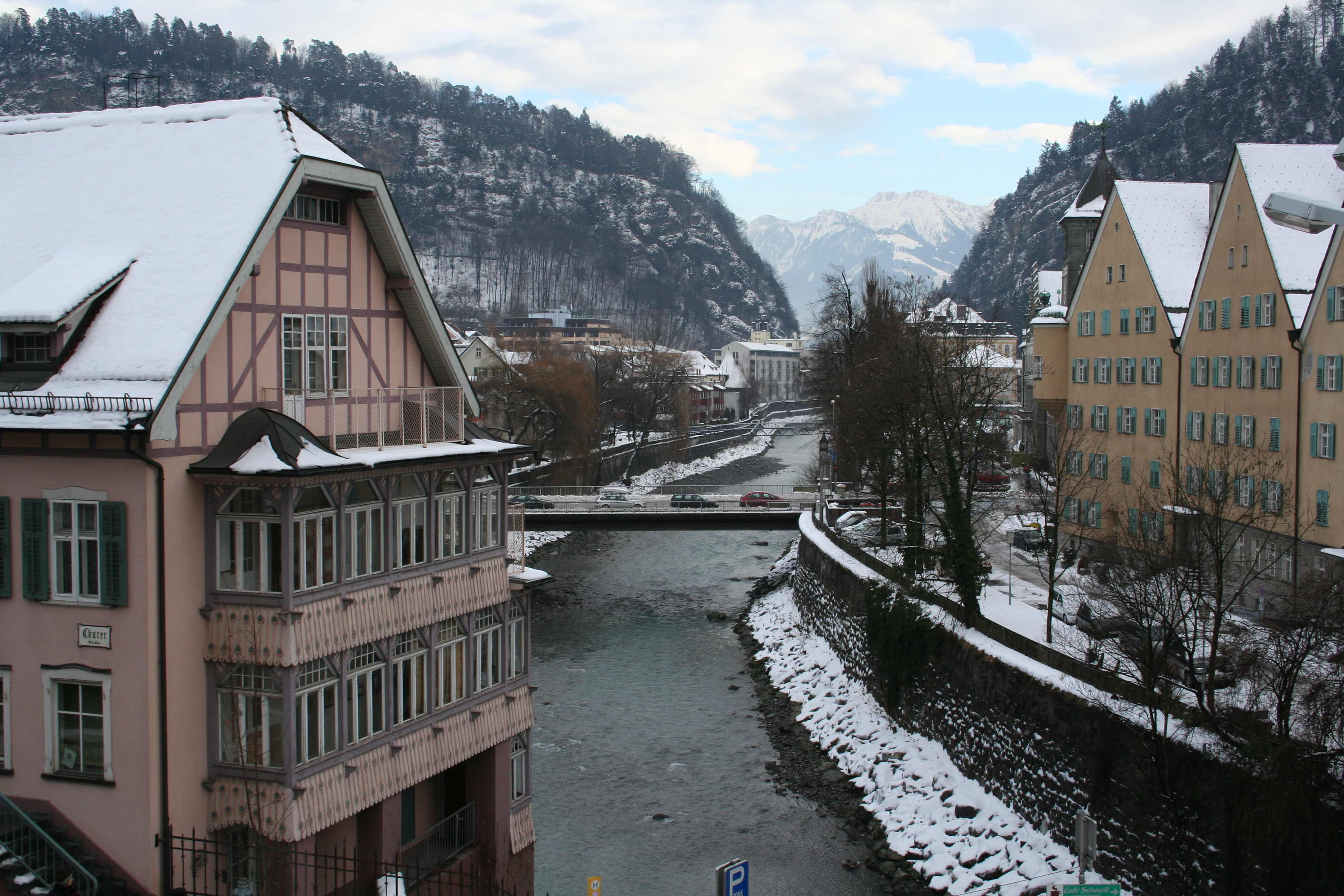 Feldkirch